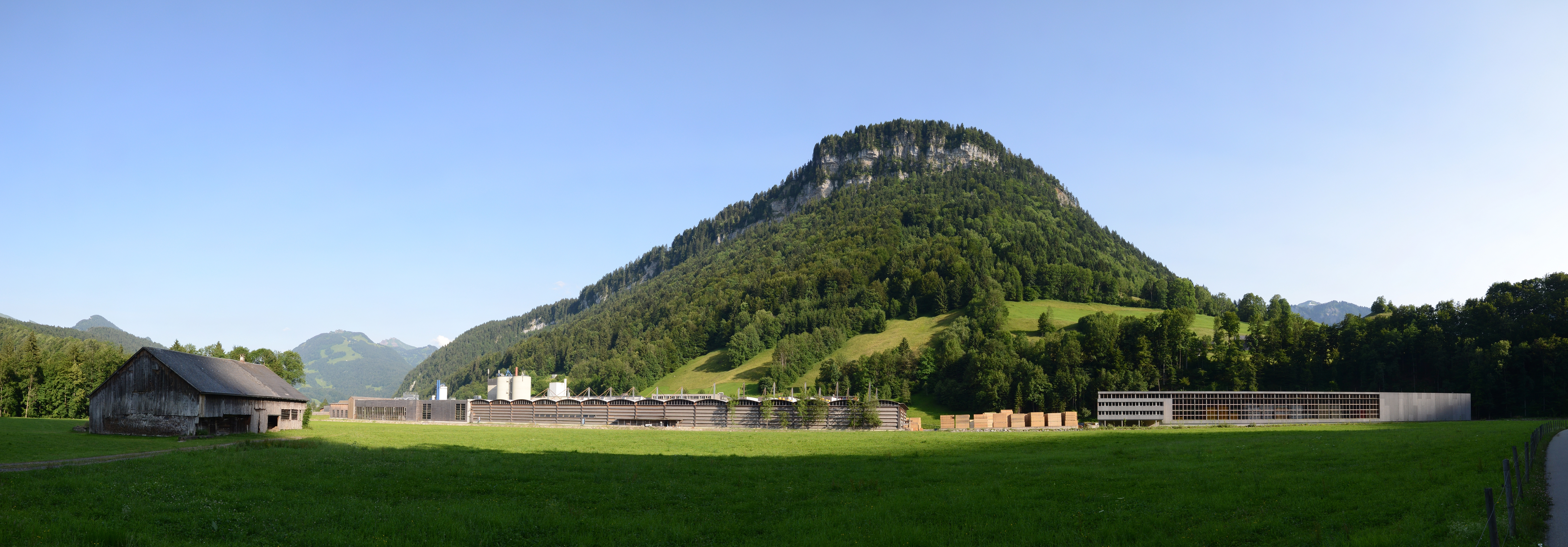 Mayr - Melnhof Kaufmann Reuthe GmbH, in Reuthe, ein Unternehmen der Mayr-Melnhof Holz Holding.